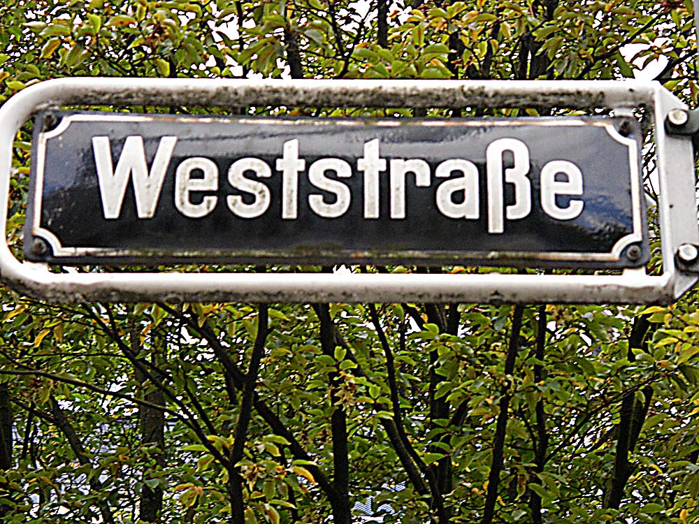 Schilder Weststrasse Benrath. ru: Дюссельдорф-Бенрат, указатель улицы Западной (Weststrasse)